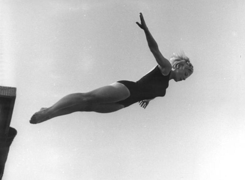 Marina Janicke ADN-ZB Gahlbeck 18-7-71 Berlin: DDR-Meisterschaften im Wasserspringen (1. Tag)- Bei den Damen erkämpfte sich im Turmspringen Marina Janicke vom TSC Berlin (hier bei einem früheren Wettkampf) mit 353,85 Punkten den Meistertitel.